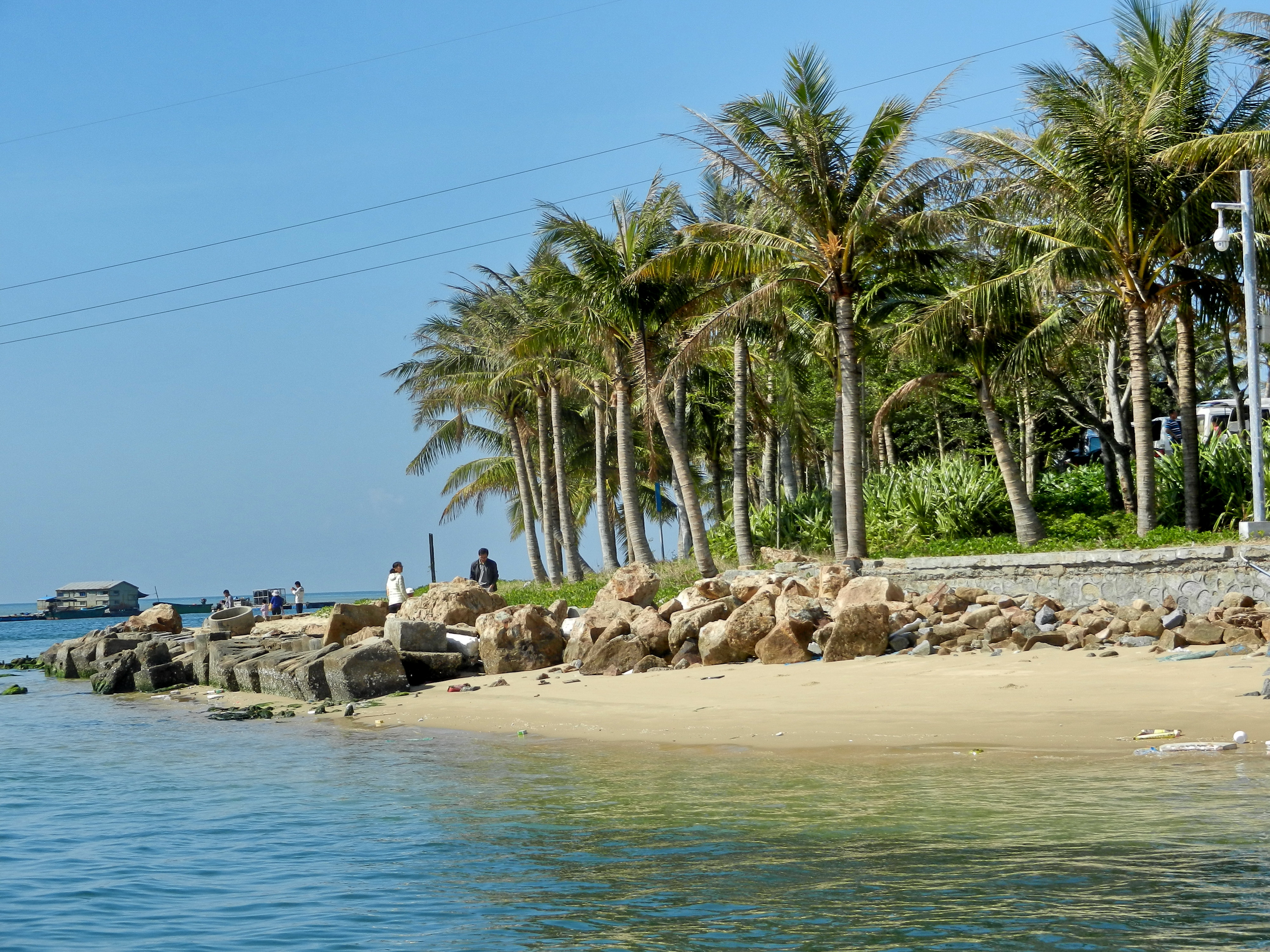 Lingshui Hainan